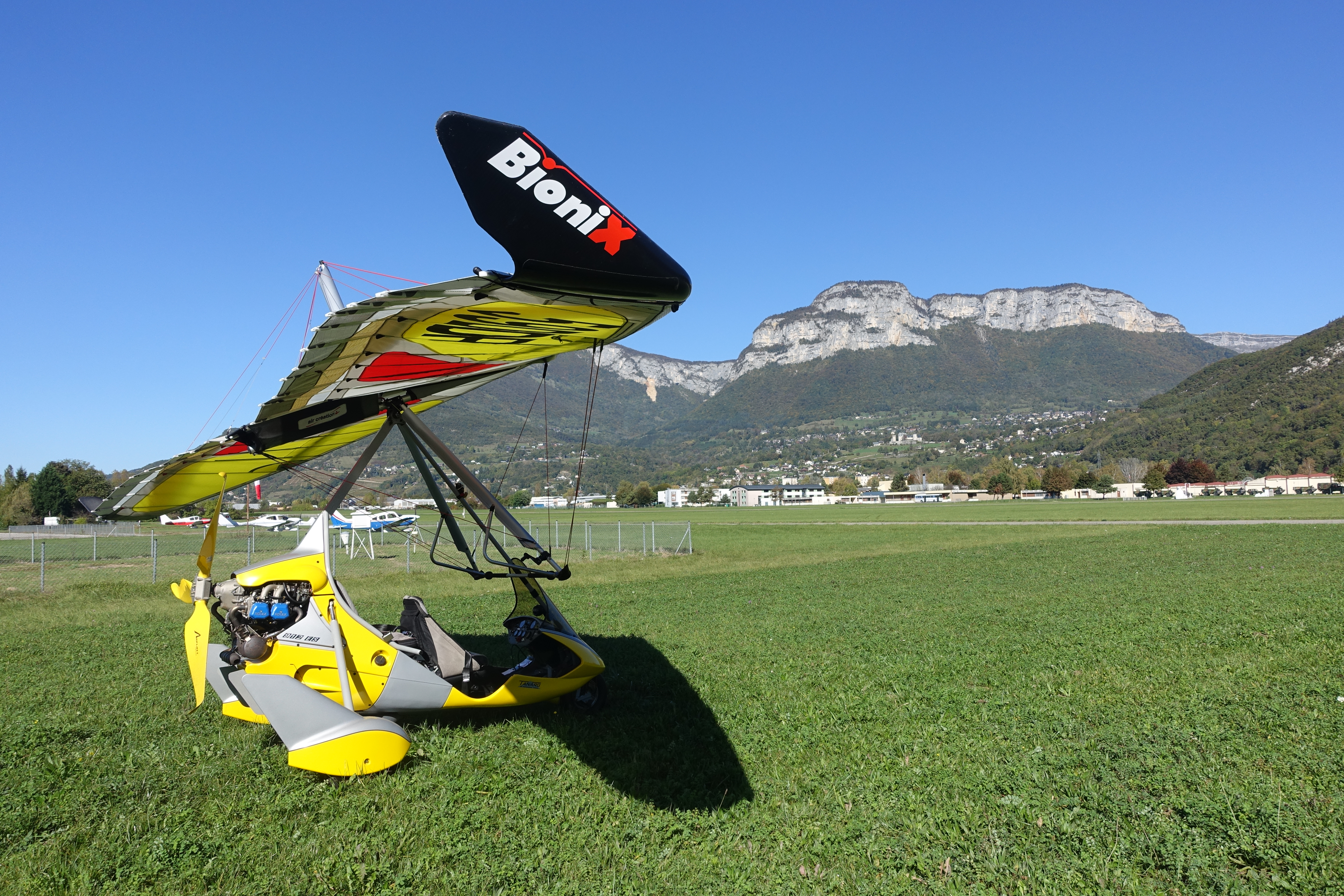 ULM Air Creation Tanarg avec une aile Bionix devant les Bauges